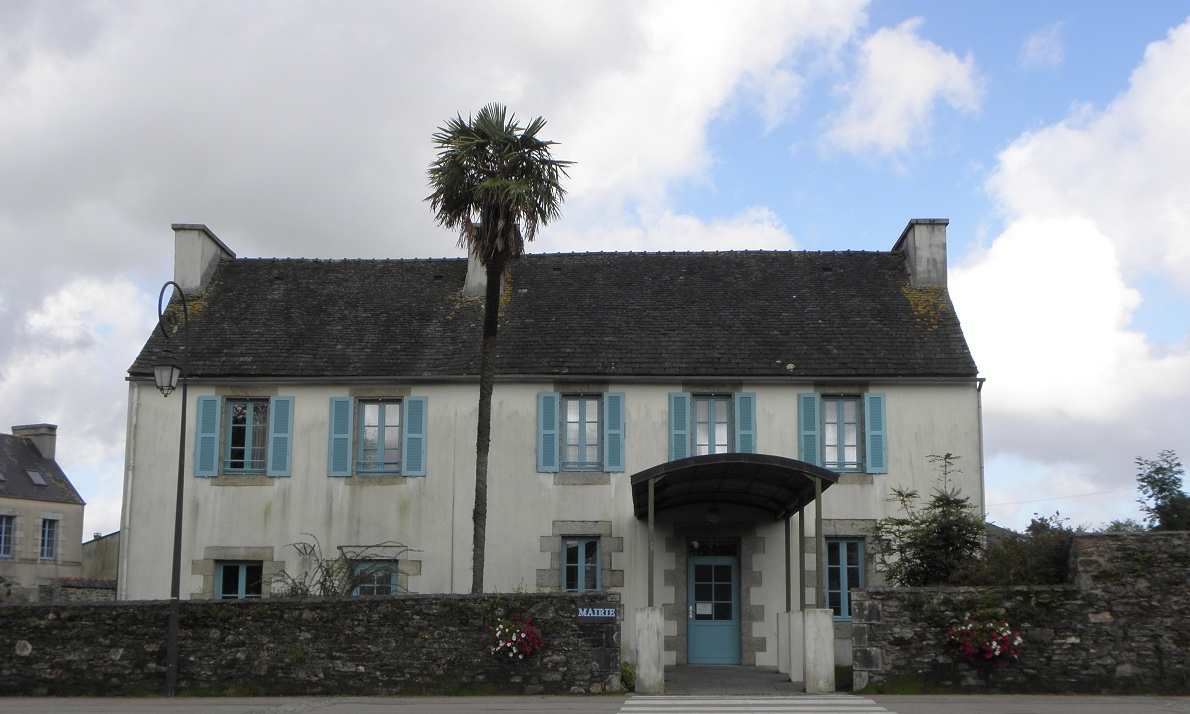 Mairie de Locmélar (29).